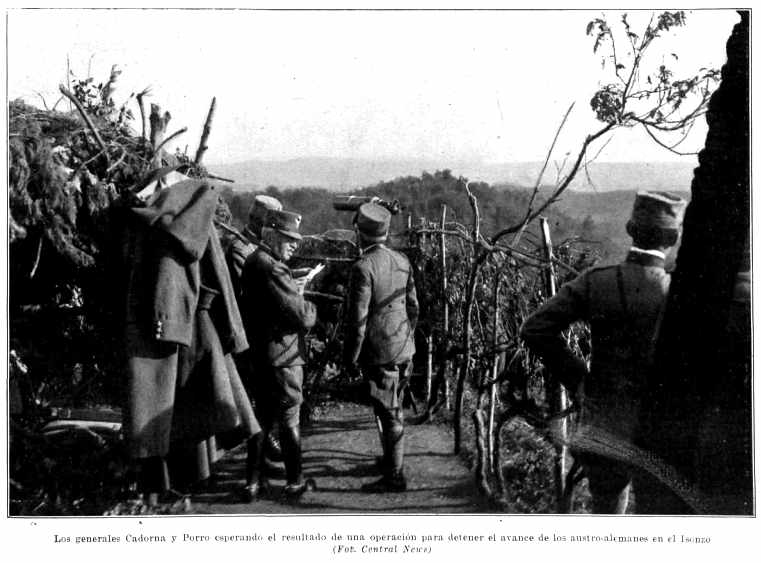 I generali italiani Luigi Cadorna e Carlo Porro sulla linea dell'Isonzo